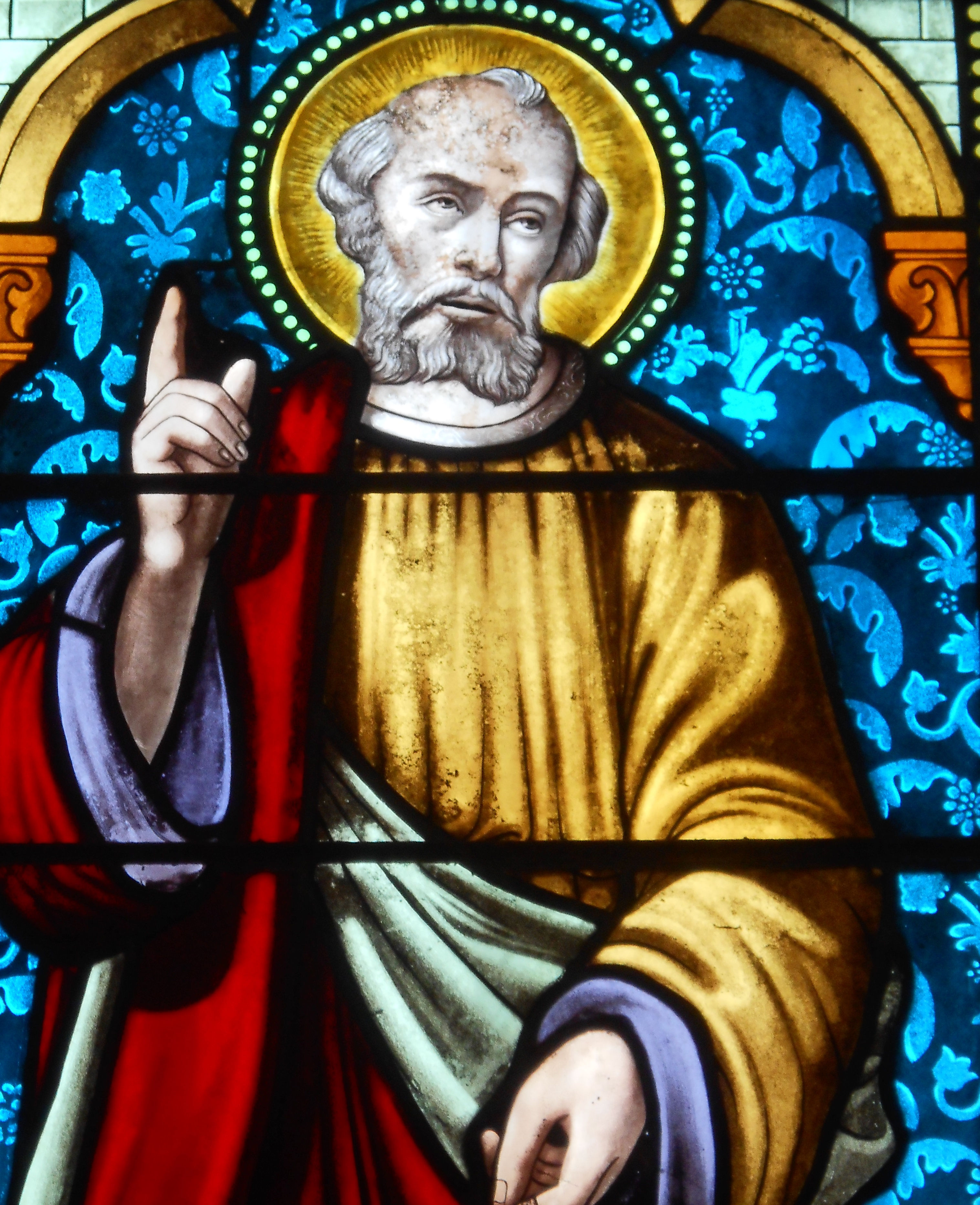 Détail d'un vitrail de l'église Saint-Pierre de Gouttières représentant Saint-Pierre, un des deux saints patrons de la commune.